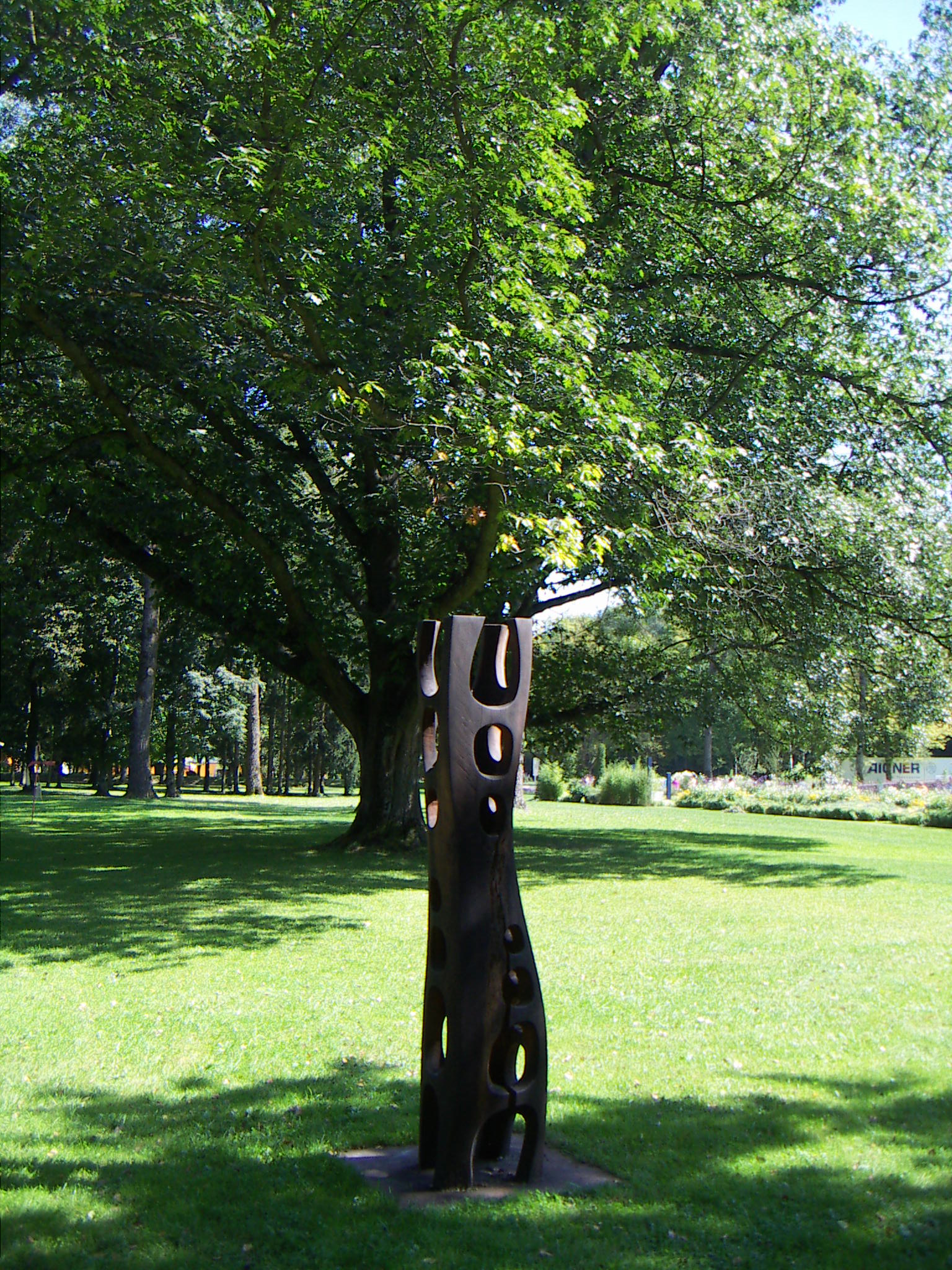 Kunstzone Botanica 09, in Bad Schallerbach; Skulptur aus Birnbaumholz von Stefan Esterbauer, Titel: Durchschaubar, 2007.